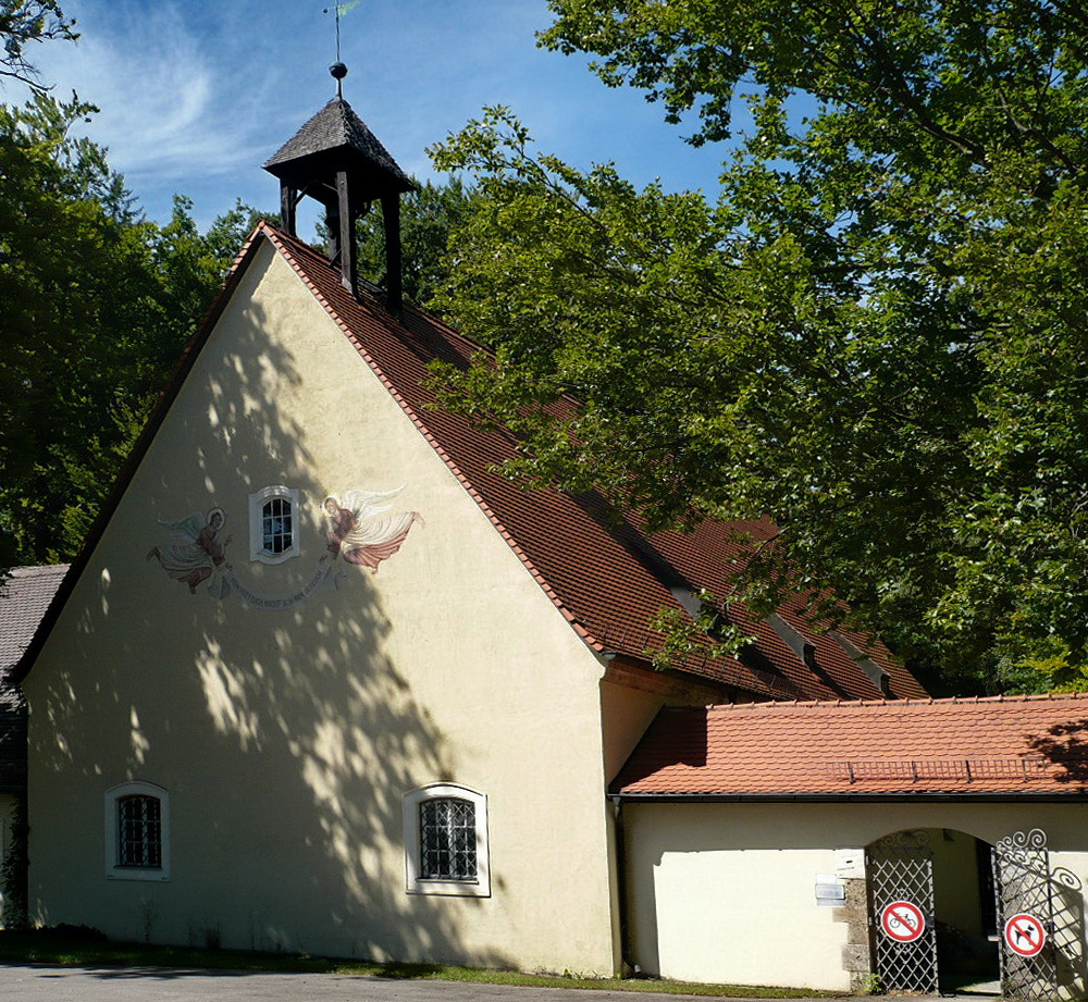 Eingang Waldfriedhof Solln in München